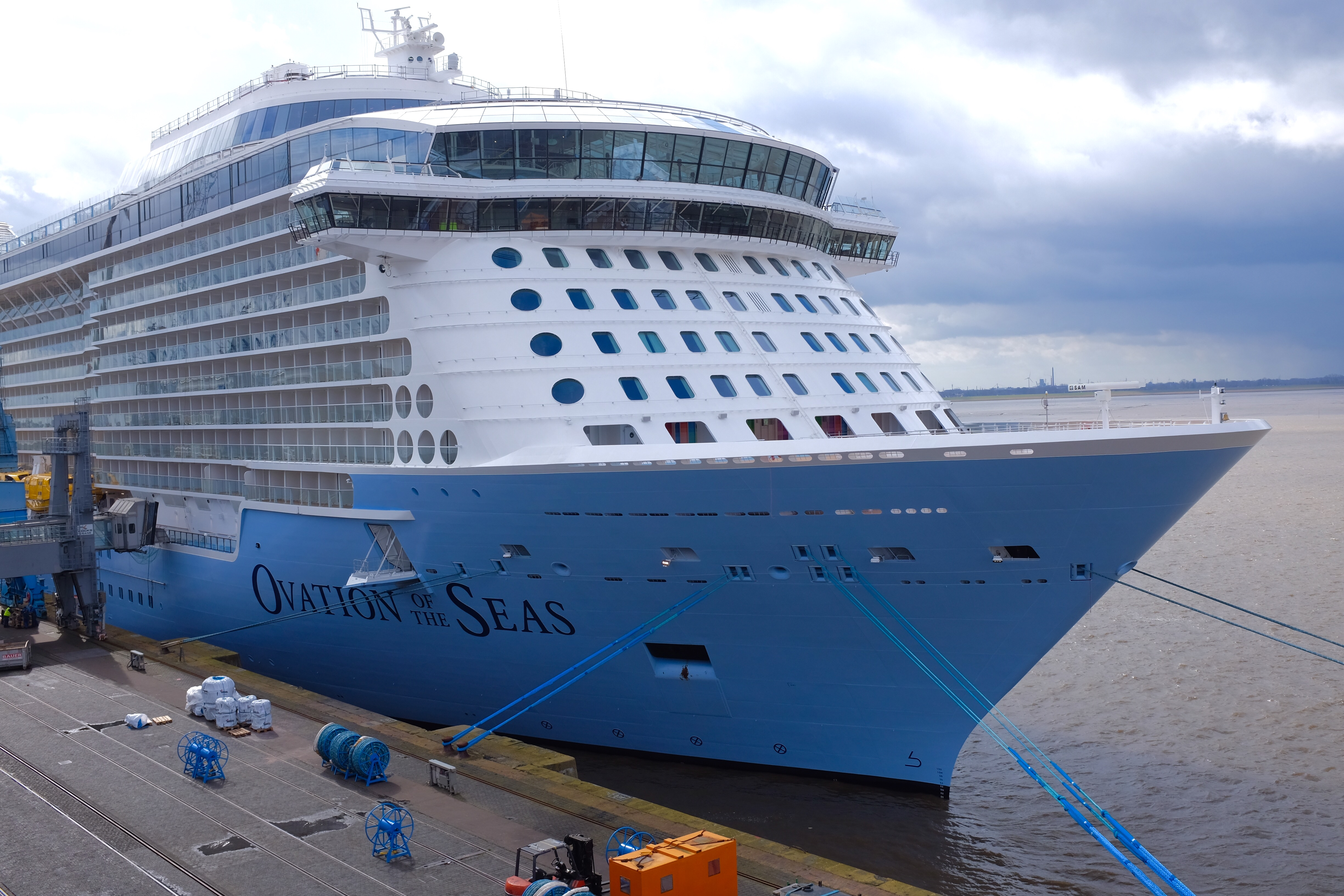 Endausrüstung an der Kolumbuskaje in Bremerhaven 2016